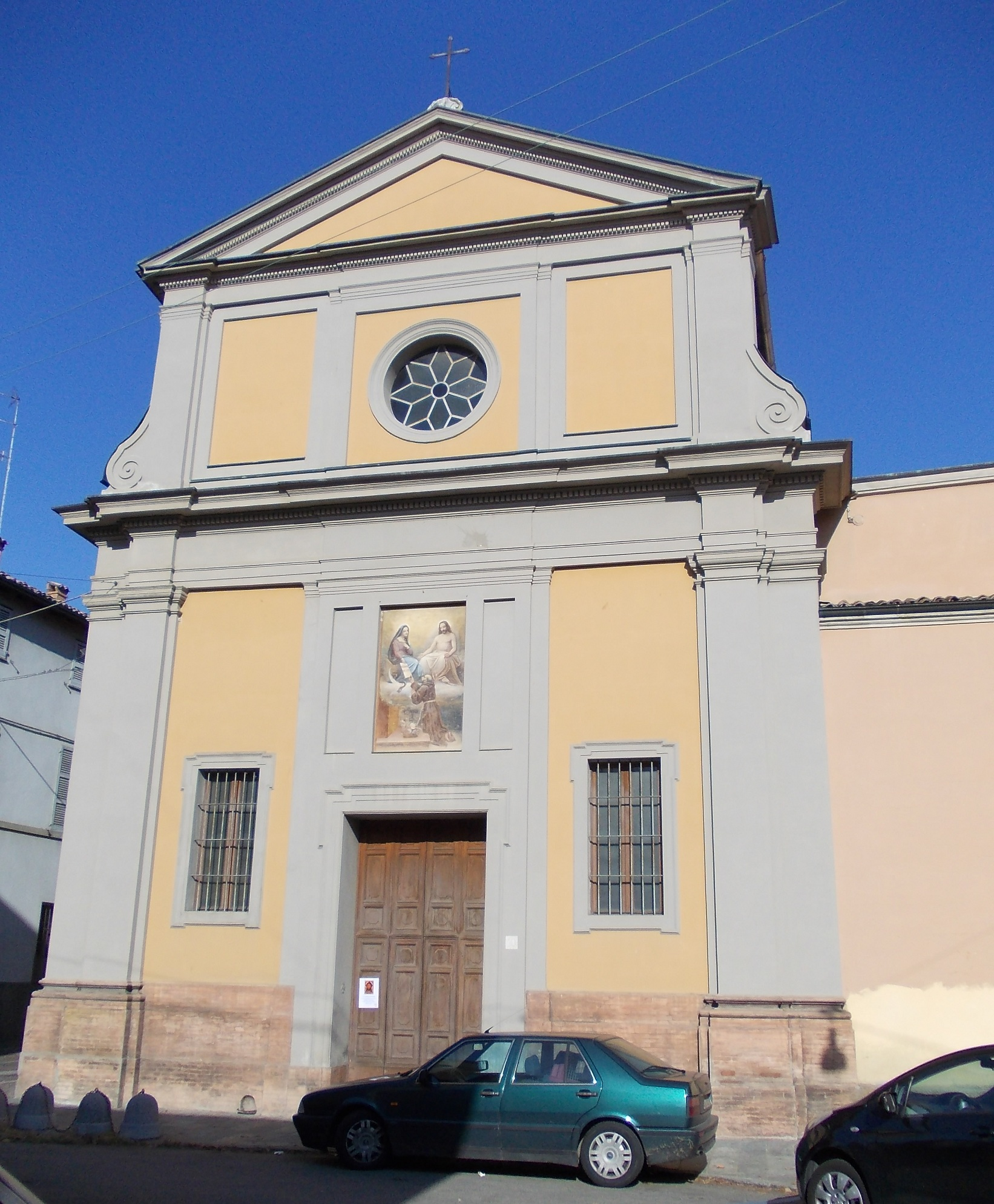 La facciata della chiesa di Santa Caterina a Parma